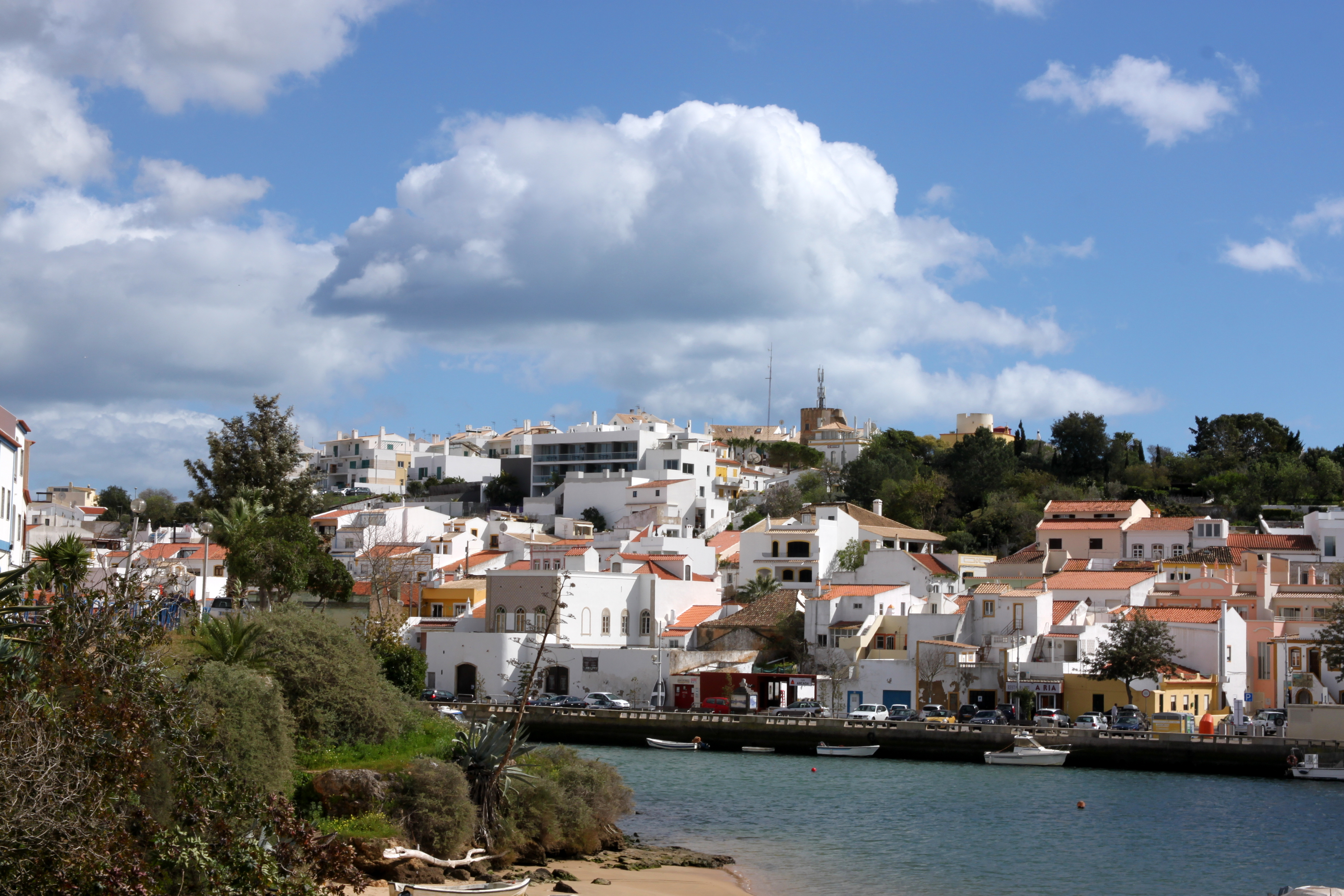 Portugal - Ferragudo